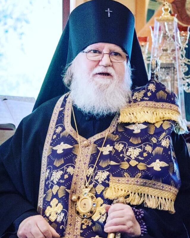 Архиепископ Феофан (Галинский)